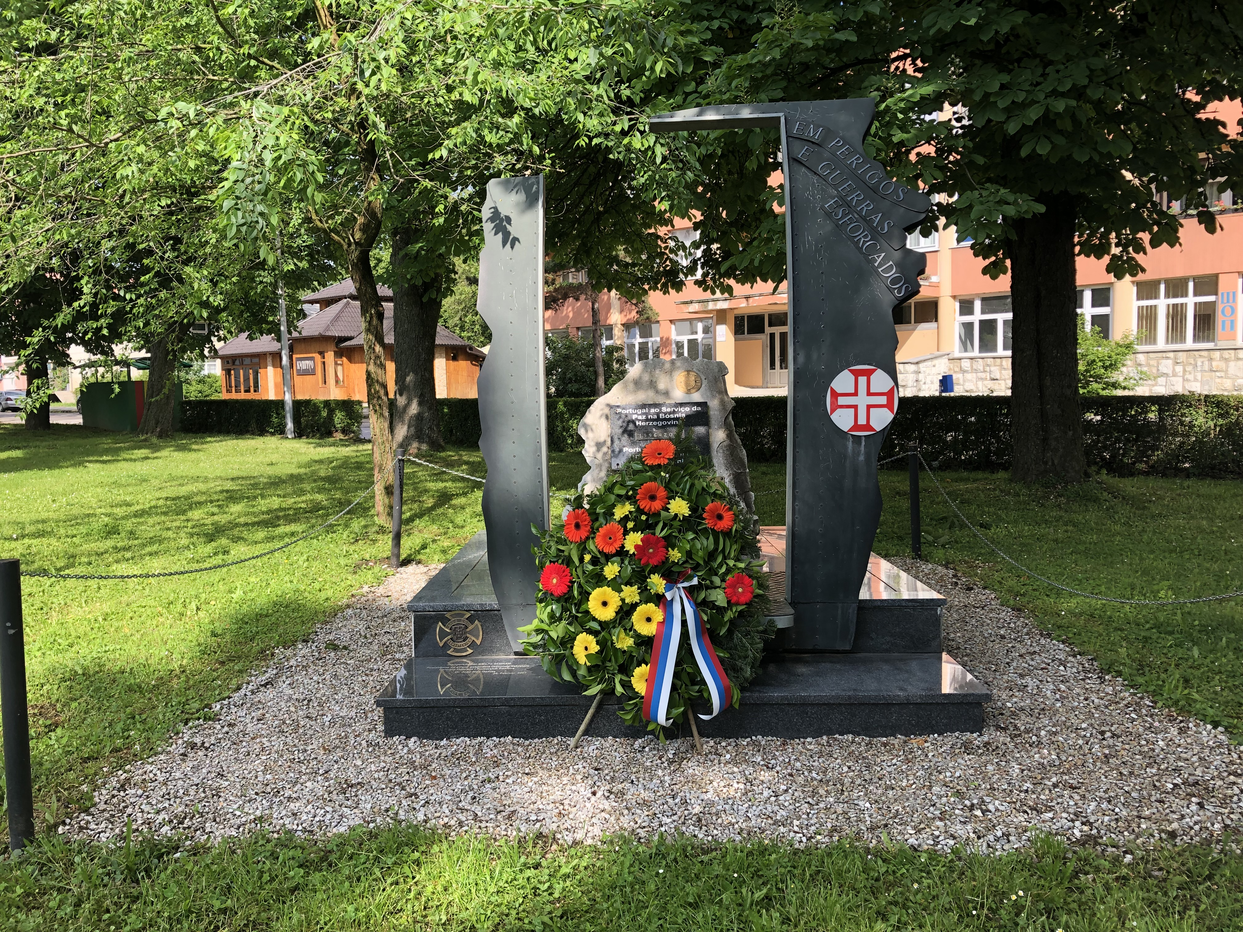 Spomenik za šest vojnika Portugalije, koji su poginuli tokom misije u BiH, nalazi se na platou ispred zgrade Gradske uprave u Doboju.